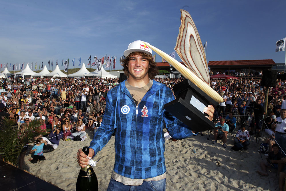 Philip Köster beim Windsurf World Cup Sylt 2011, nach der Ehrung als PWA-Weltmeister im Waveriding